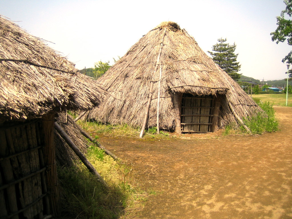 Sanno-kakoi-iseki, a Jomon archaeological site.